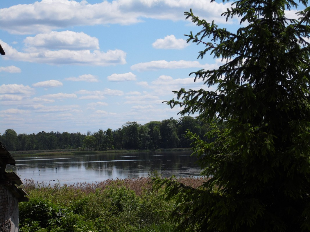 WIDOK NA JEZIORO.